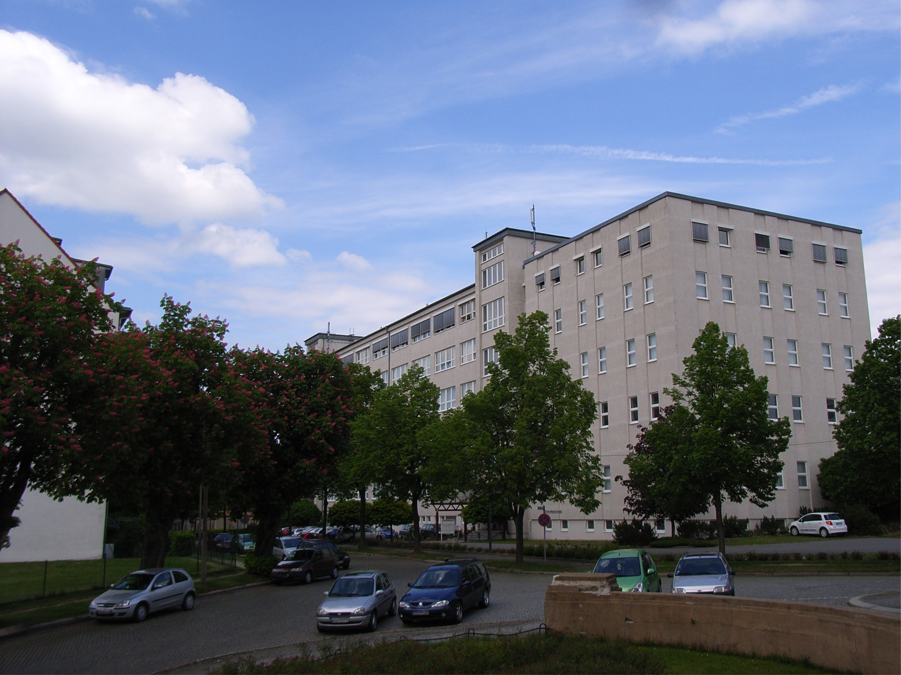 Ehemaliges Optikgebäude der Meyer-Optik in der Arndtstraße in der Görlitzer Südstadt